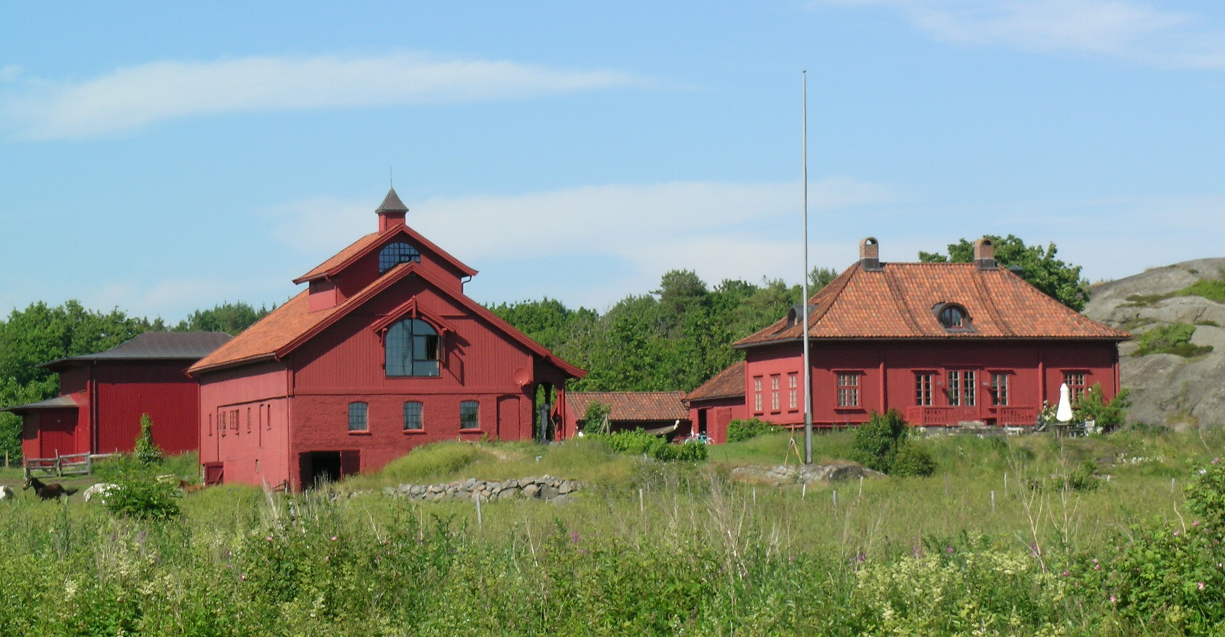 Odd Nerdrum's studio at Røvika, Larvik.